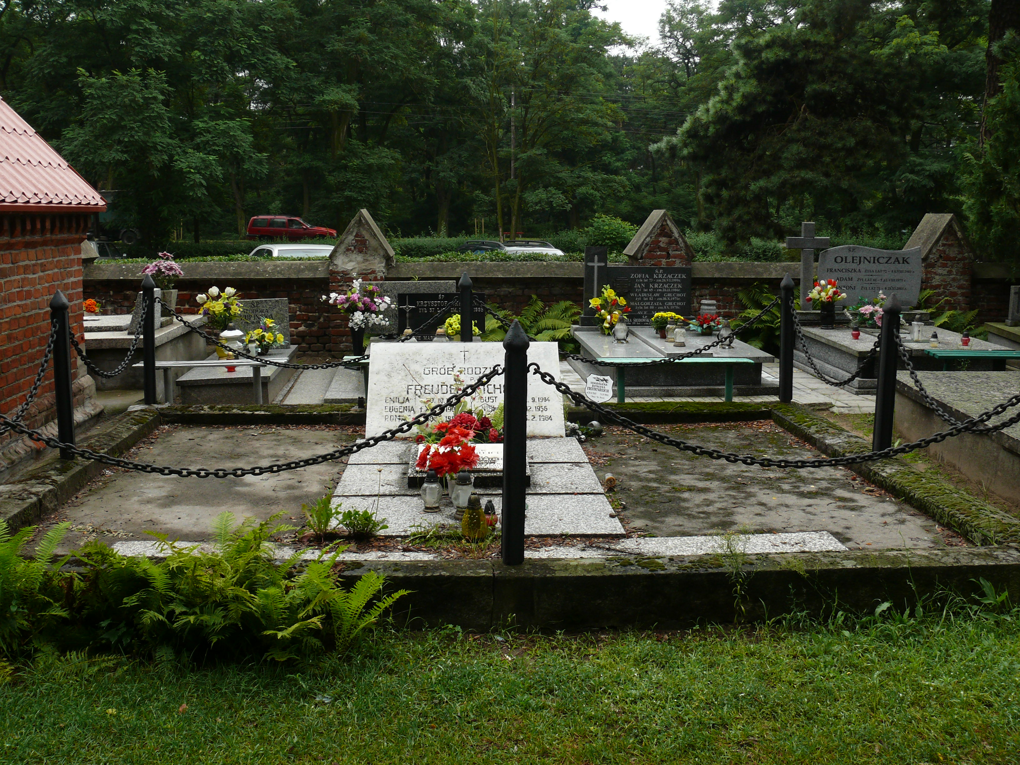 Grób rodziny Freudenreichów w Kole